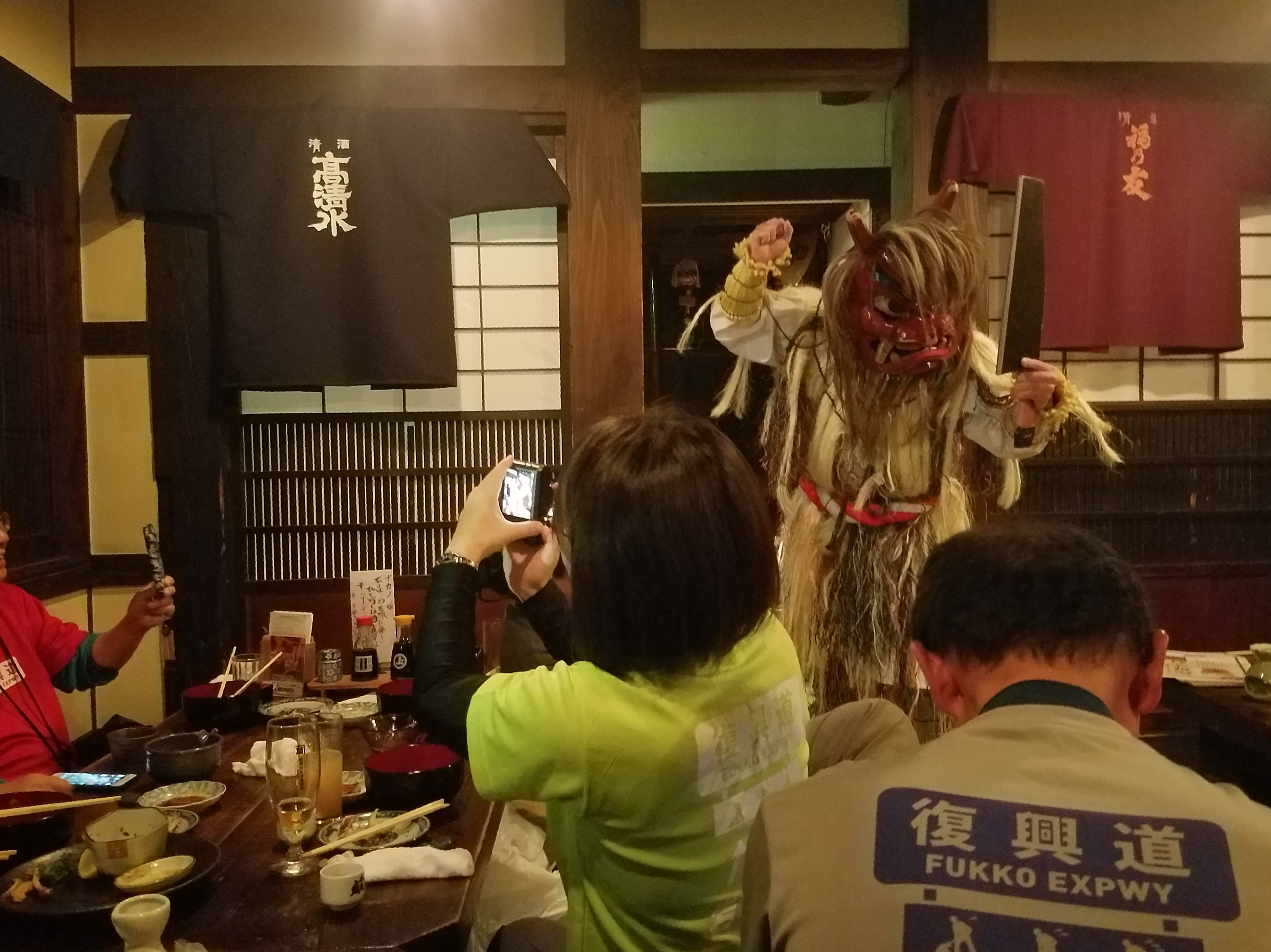 2018年5月北東北大雨 秋田市で水害ボランティア（援人 2018年 0615便）